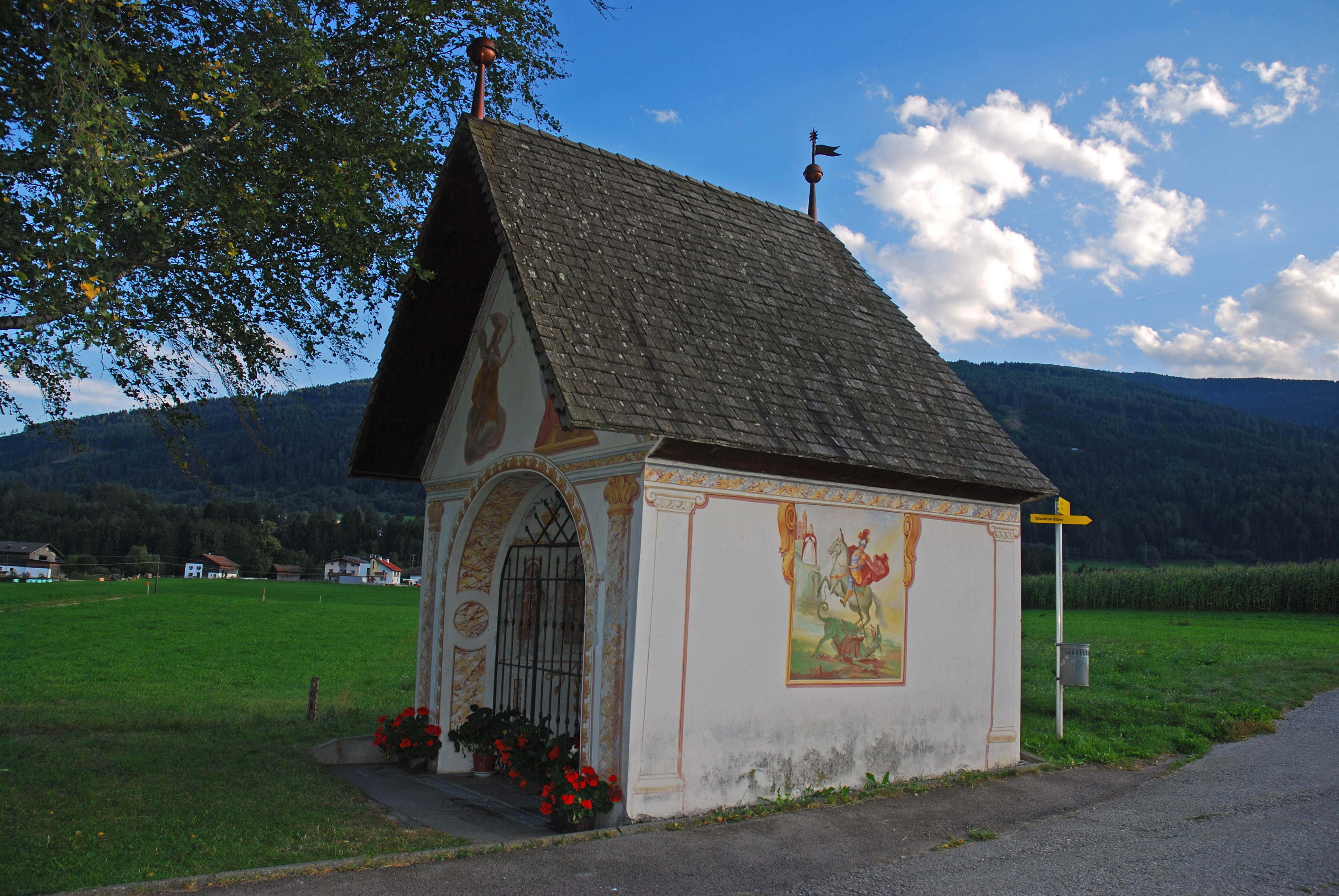 Feldkapelle, Höll-Kapelle